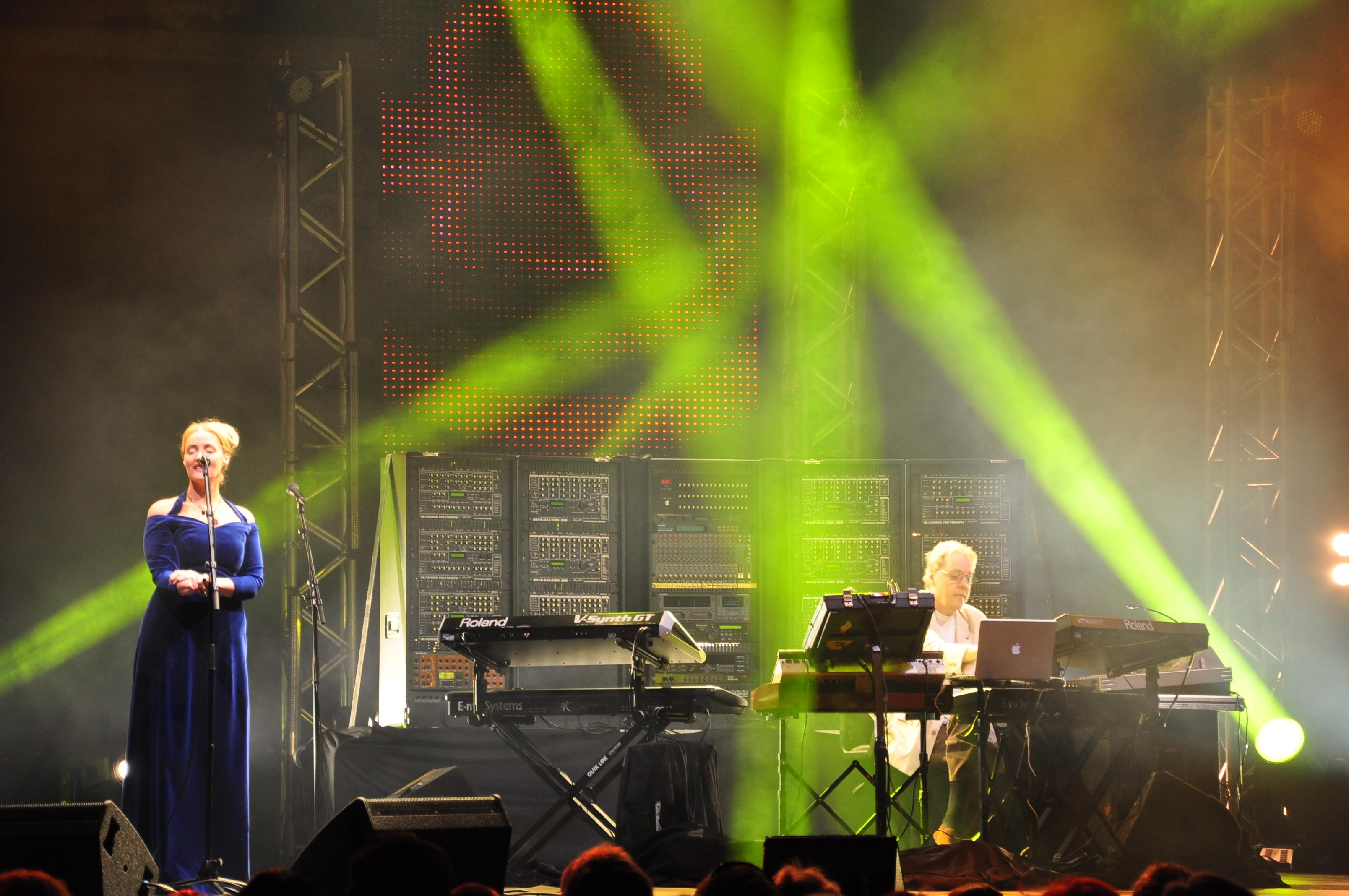 O?wietleniowiec wyczerpuje repertuar